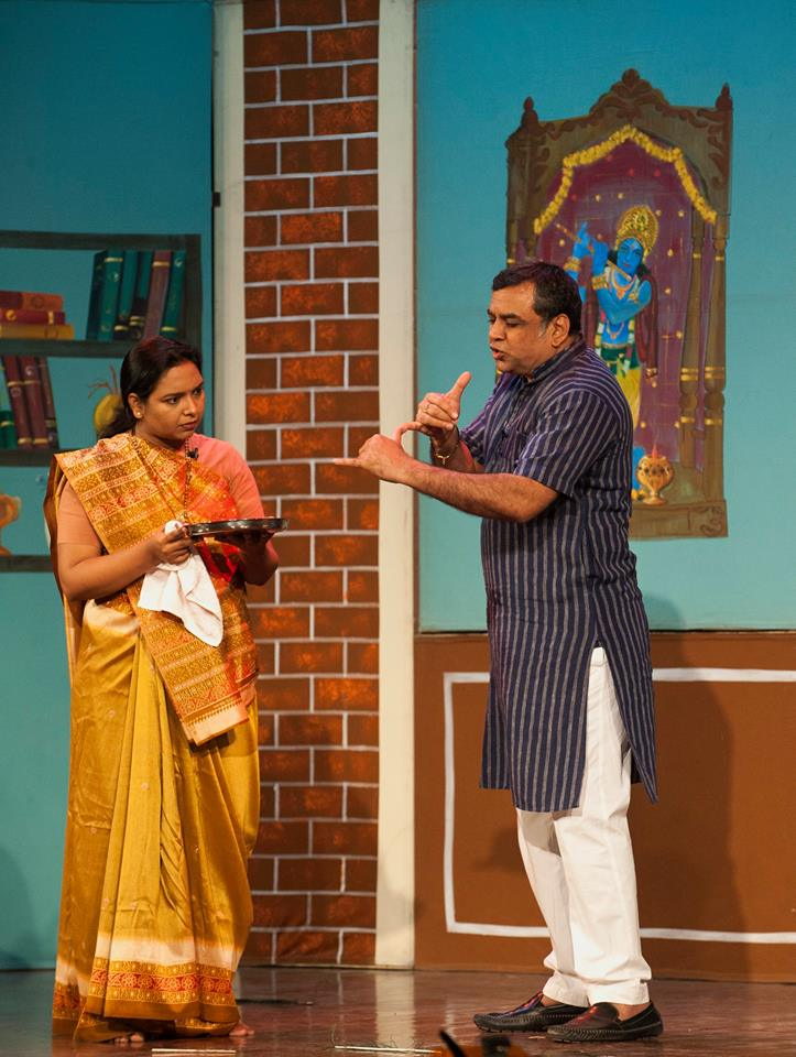 Ido: jairangam photo